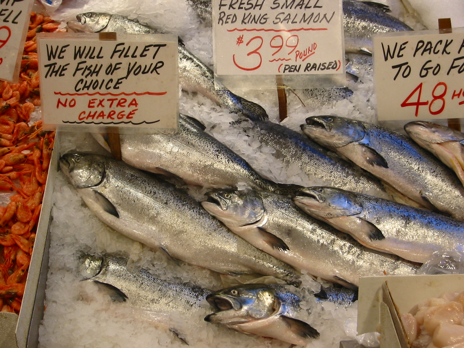 Salmon in a market, Seattle, USASalmon